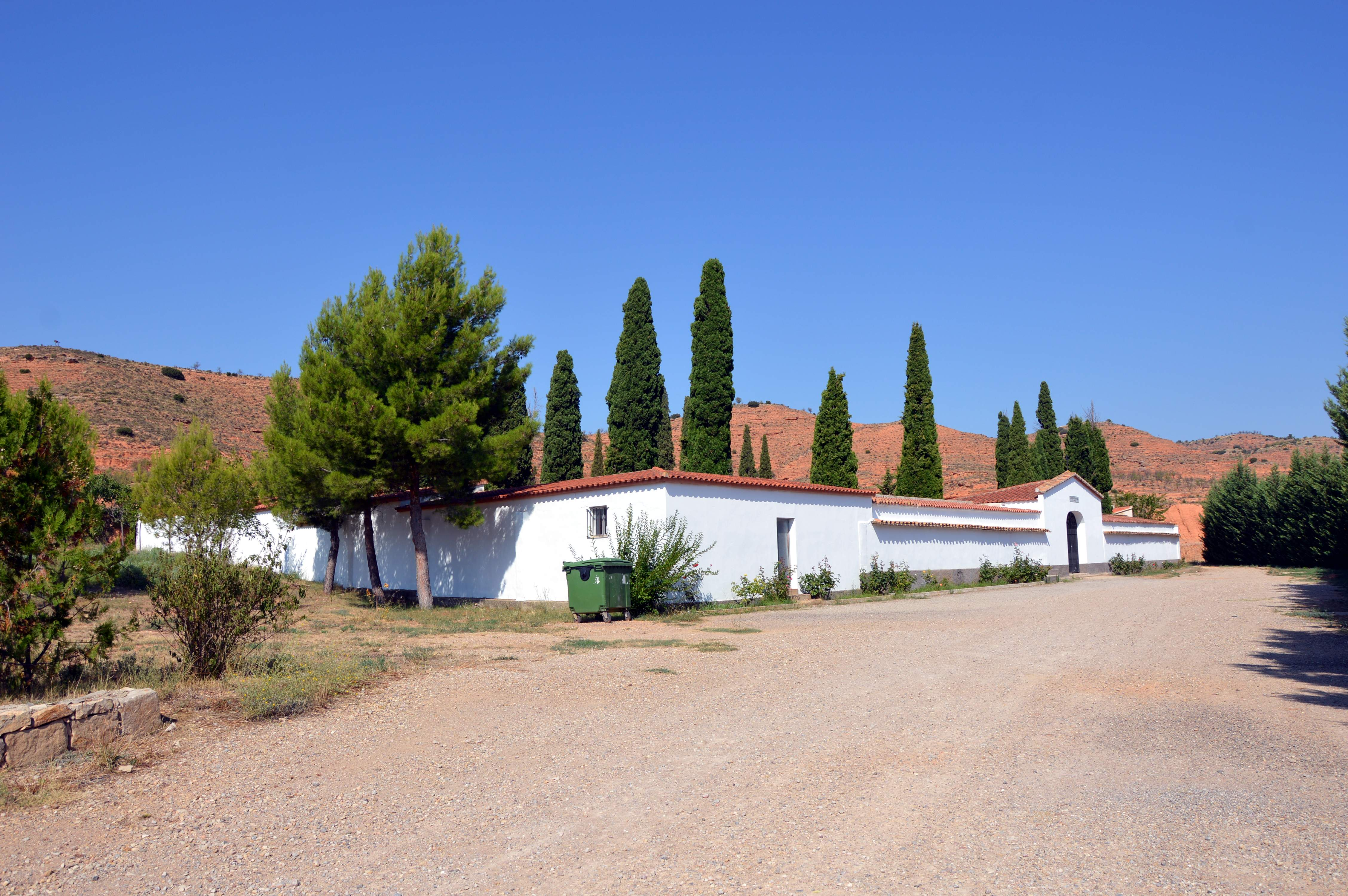 Vista fronto-lateral izquierda del cementerio municipal de Torrebaja (Valencia).